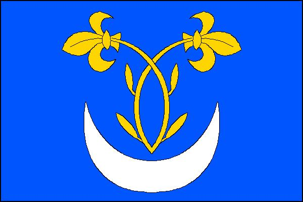 Vlajka obce Nítkovice